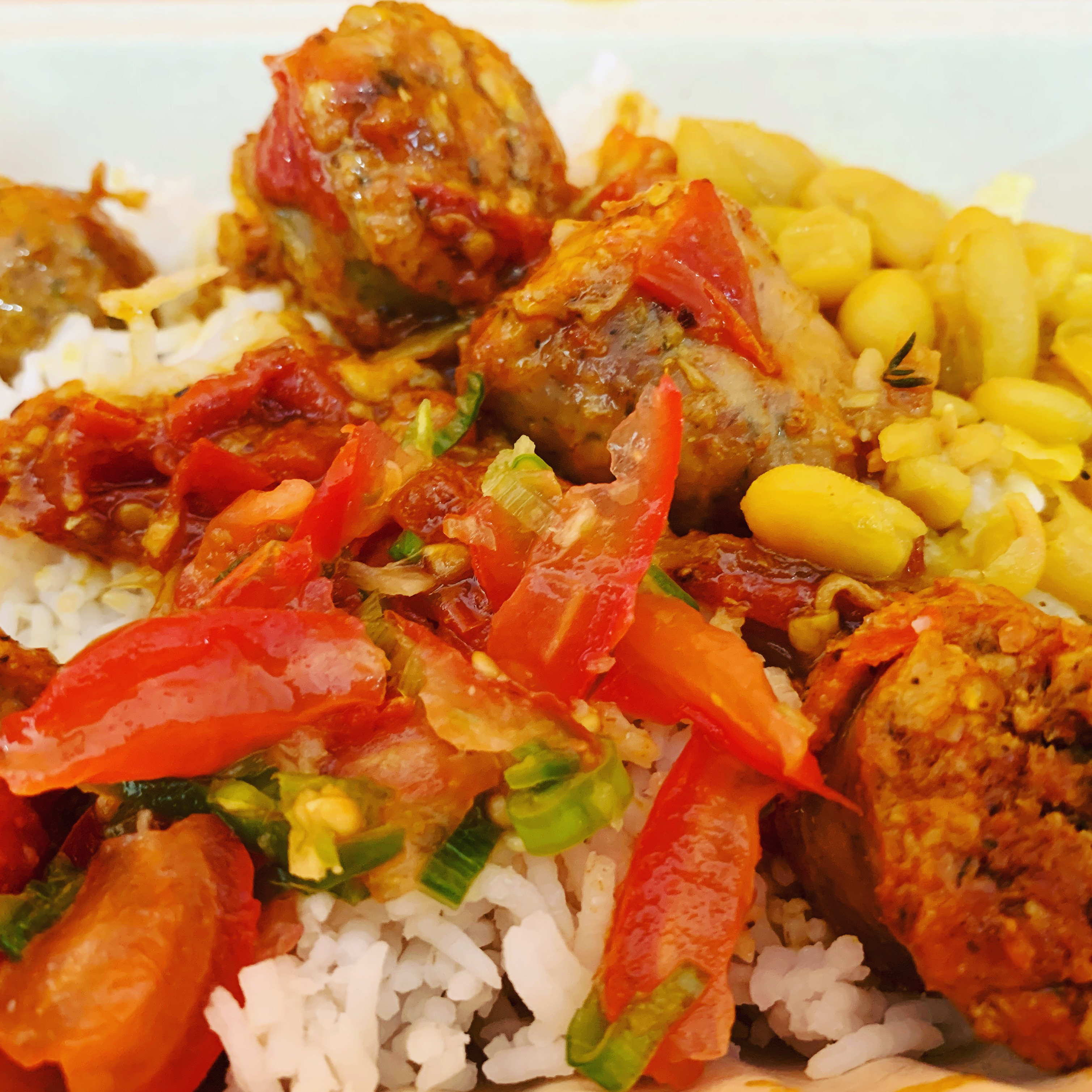 Bourbon Saveur 974 (Belley) - rougail saucisses.